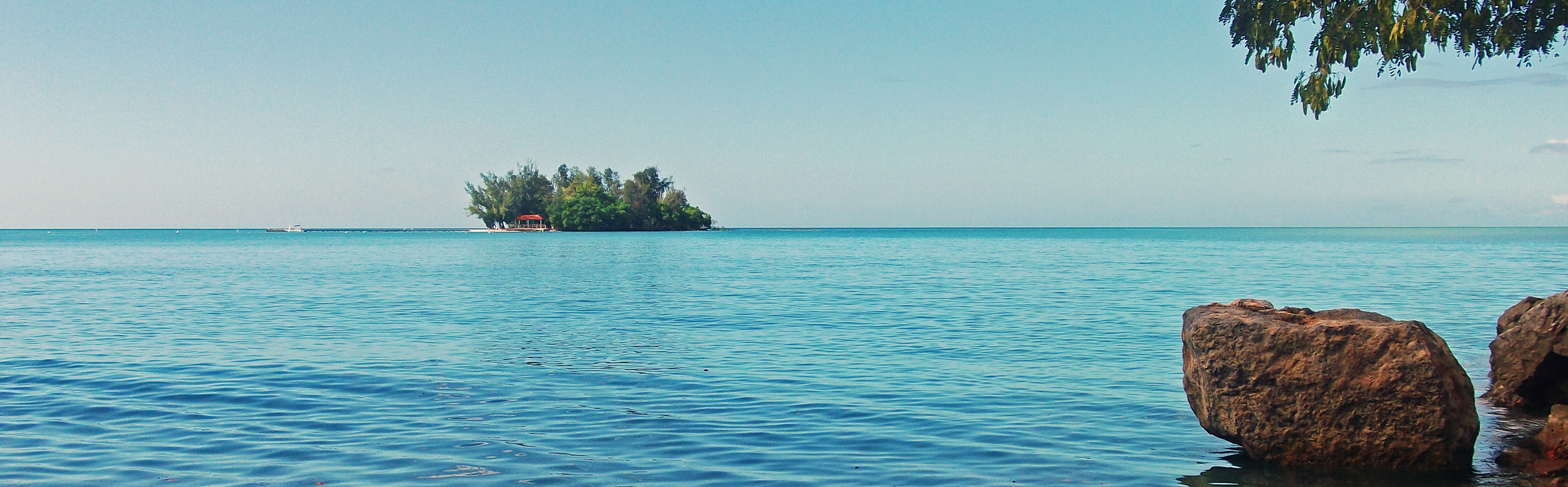 Islote Piñero (Ratones), desde la costa en Joyuda.